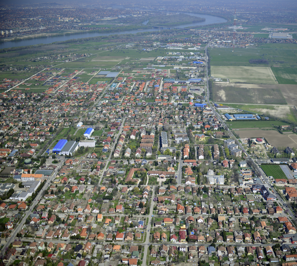 Halásztelek légi fotón (Pest megye)